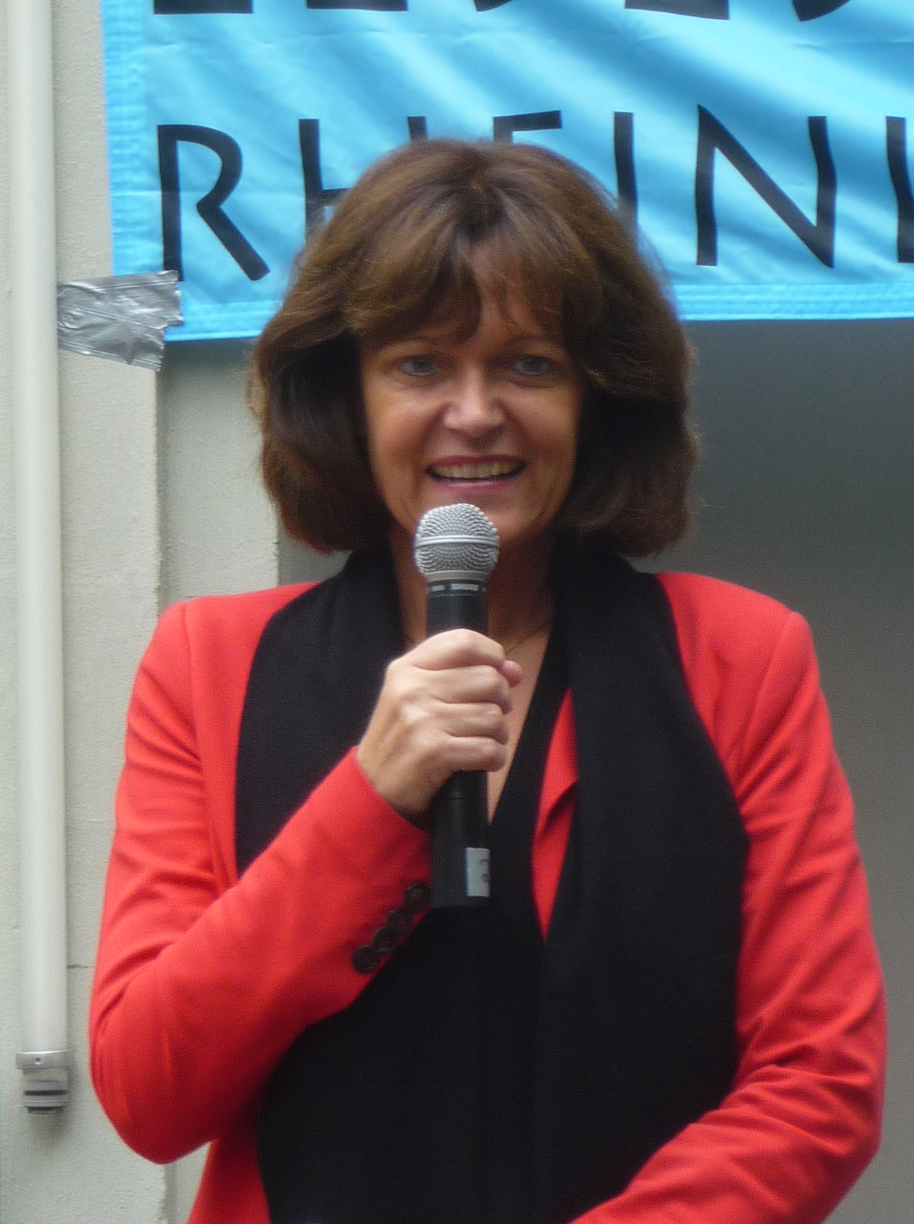 Eva Lohse, Oberbürgermeisterin von Ludwigshafen, 2012 beim Lesesommer Rheinland-Pfalz